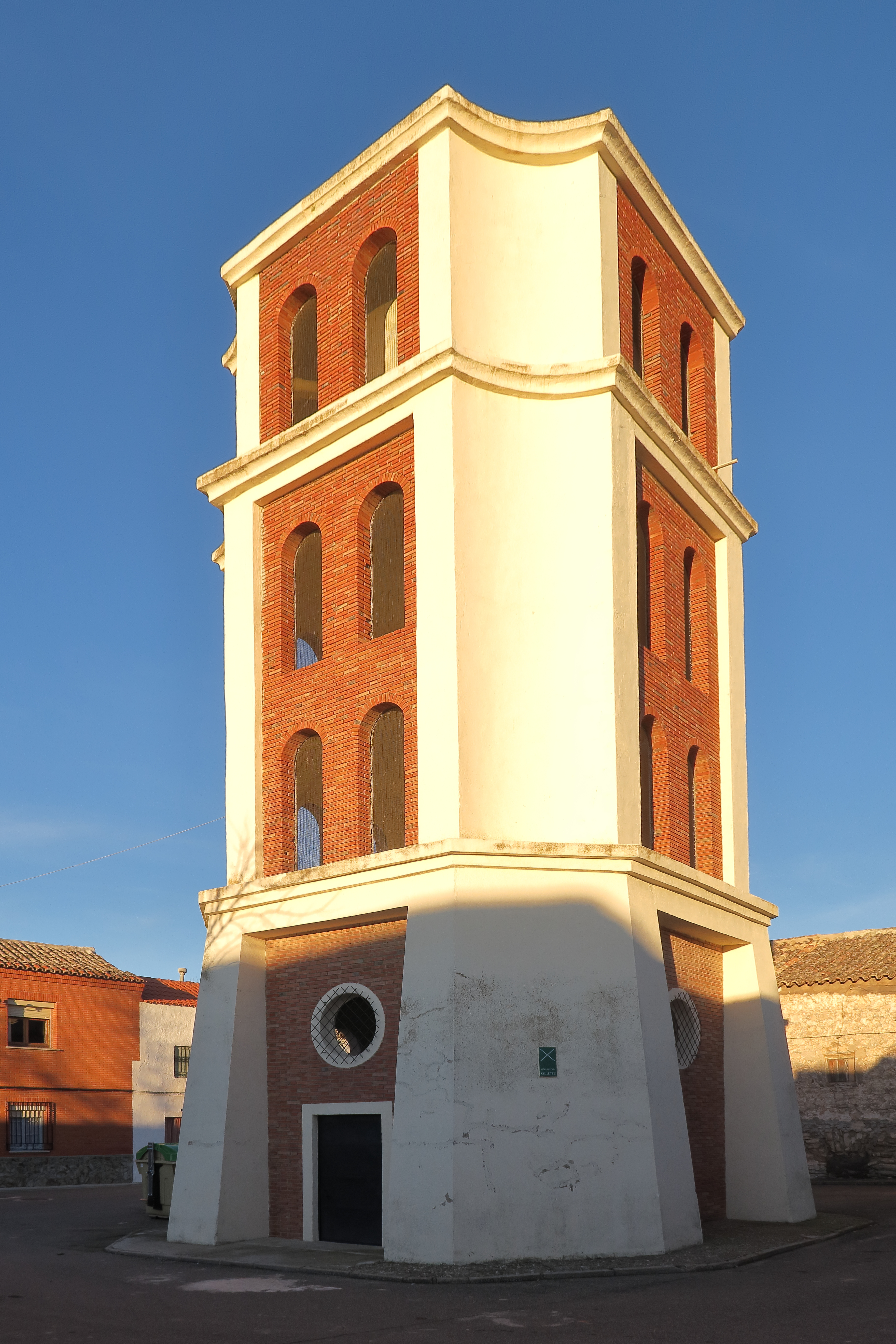 Depósito de agua del año 1950 en la Plaza de San Miguel, La Guardia, Toledo